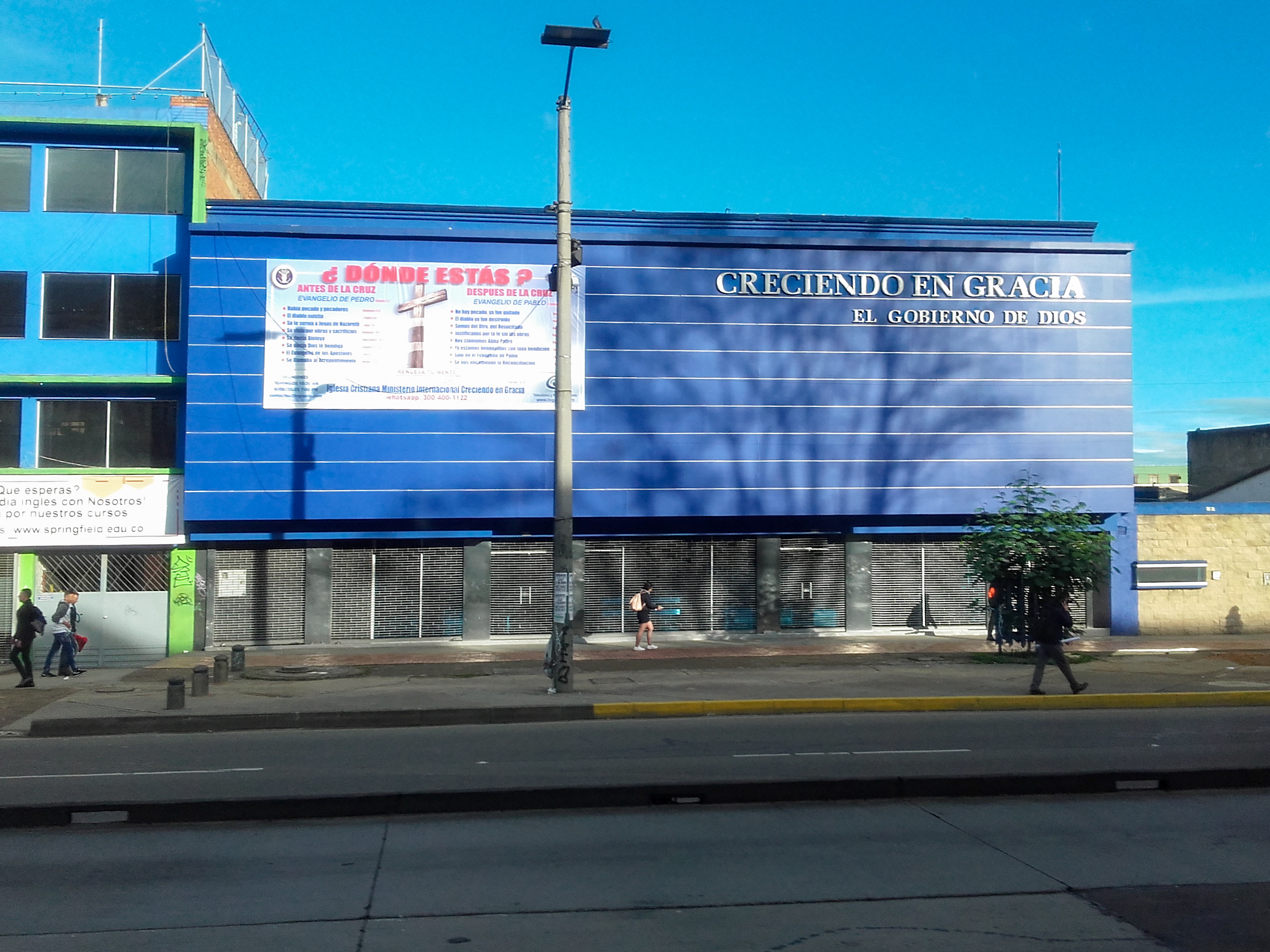 dkkjfjfjfjfjfjfn